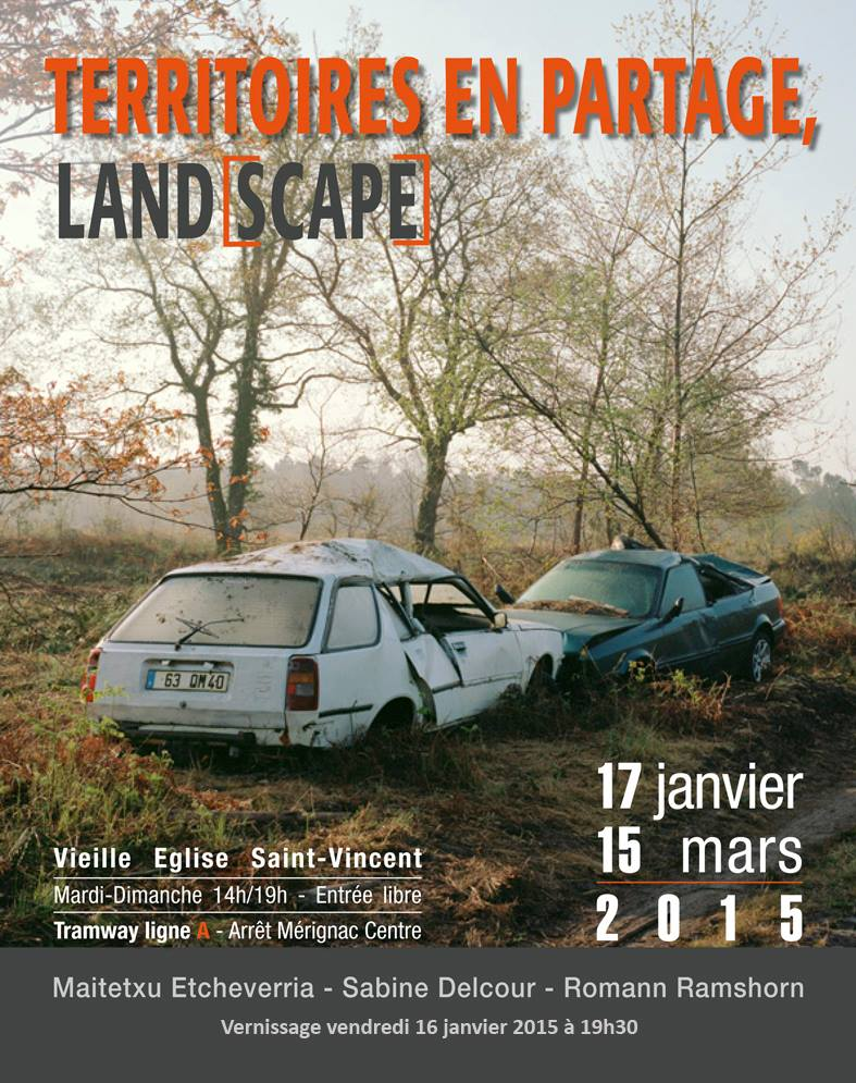 Affiche de l'exposition "[Land]scape : territoires en partage", à la Vieille Eglise de Mérignac. Photographie de l'artiste Maitetxu Etcheverria.